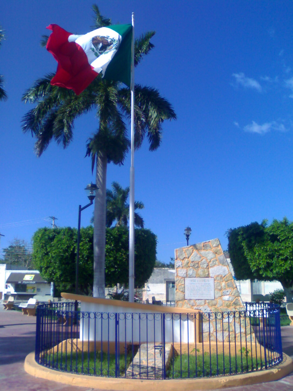 Parque Telchac Pueblo